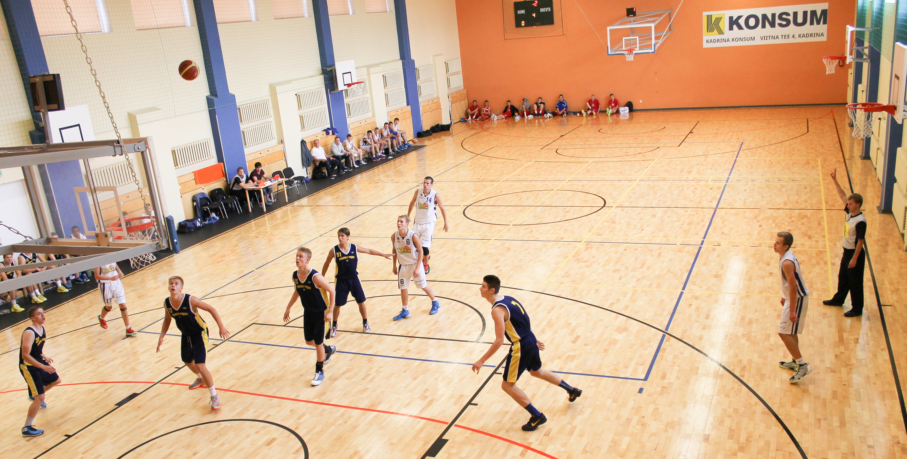 New Generation Mini Cup Kadrinas